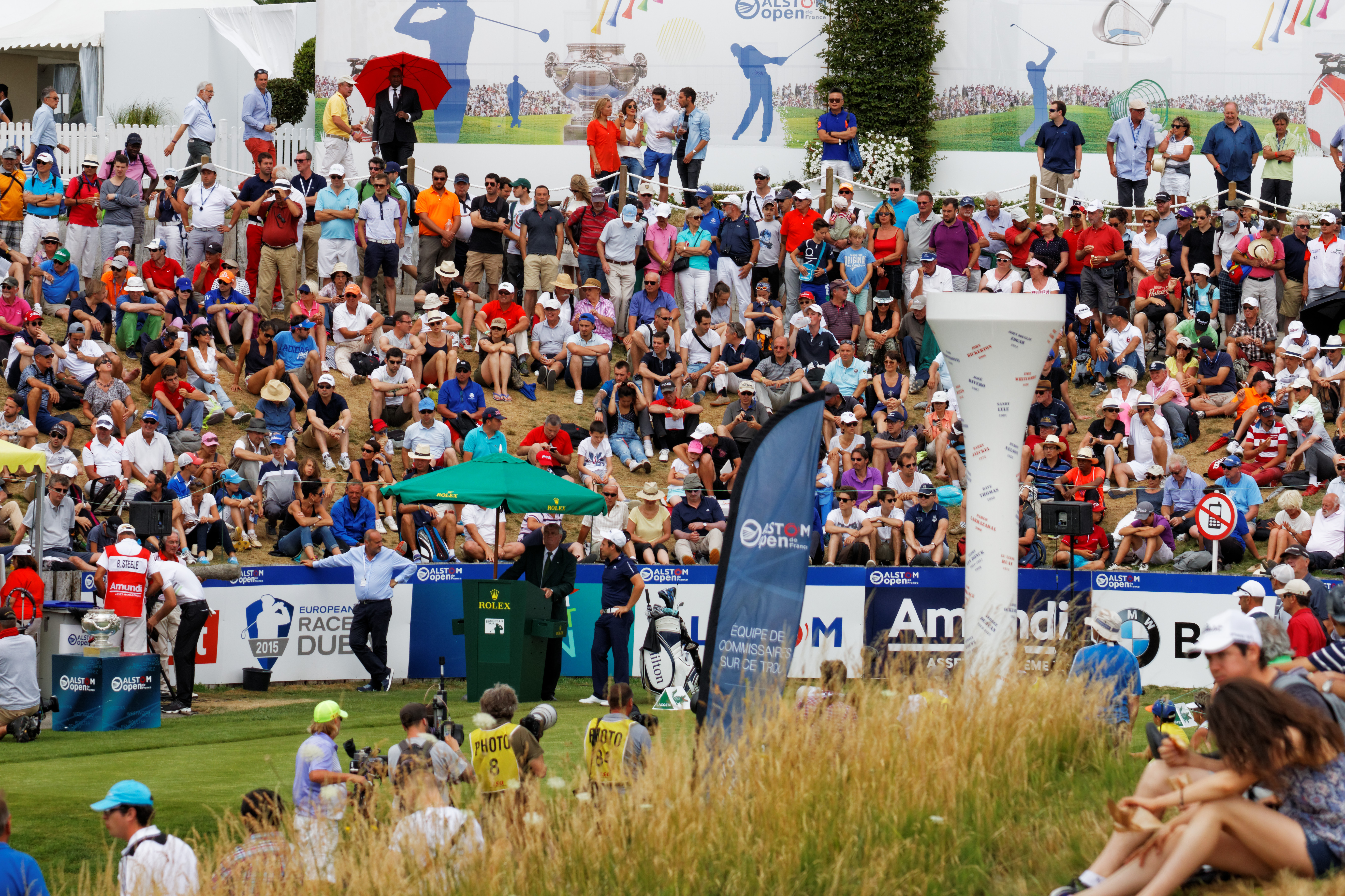 Image prise lors de l'Alstom - Open de France 2015, départ du trou n°1